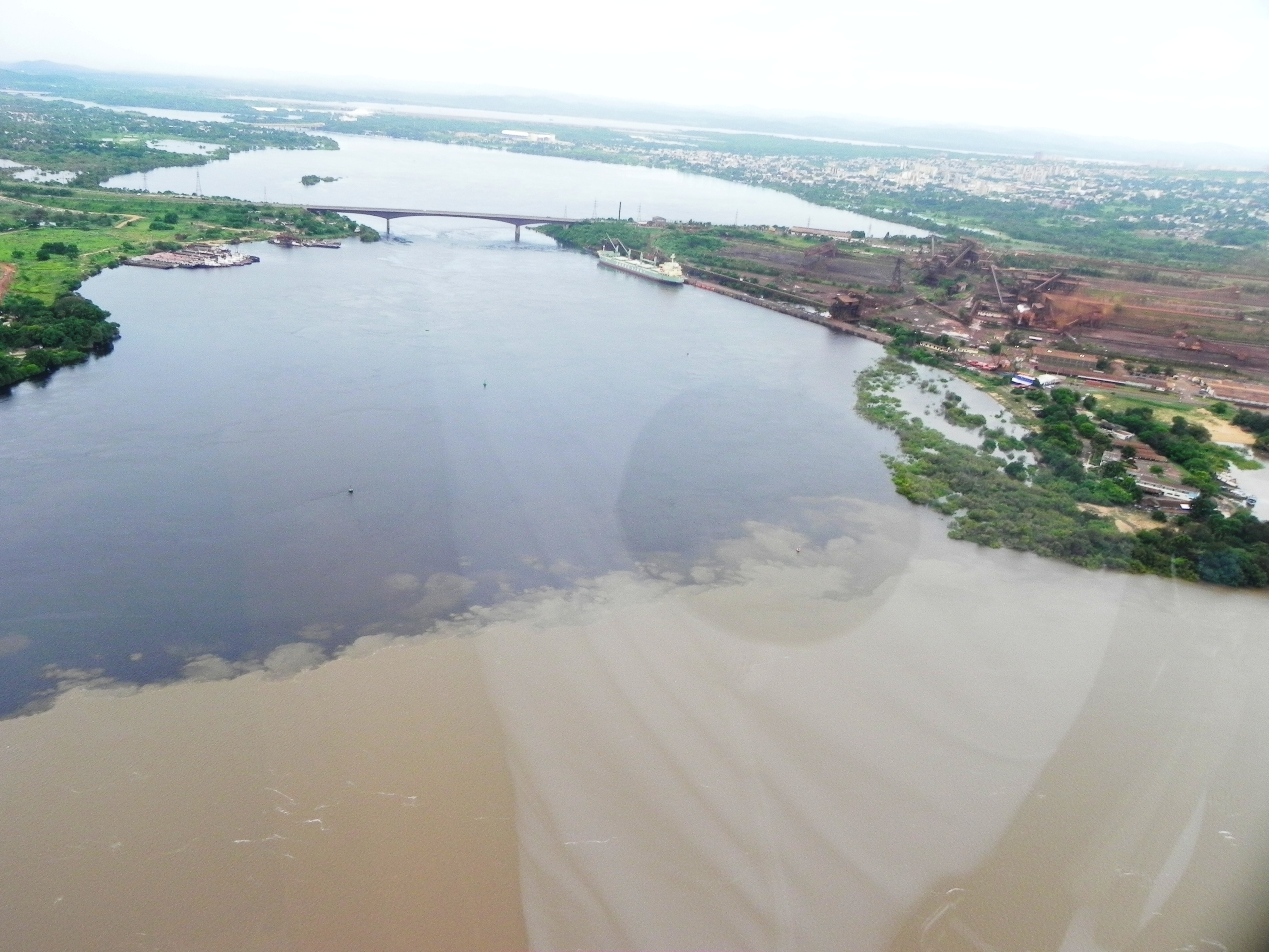 Vista aérea de la confluencia de los ríos Caroní y Orinoco.